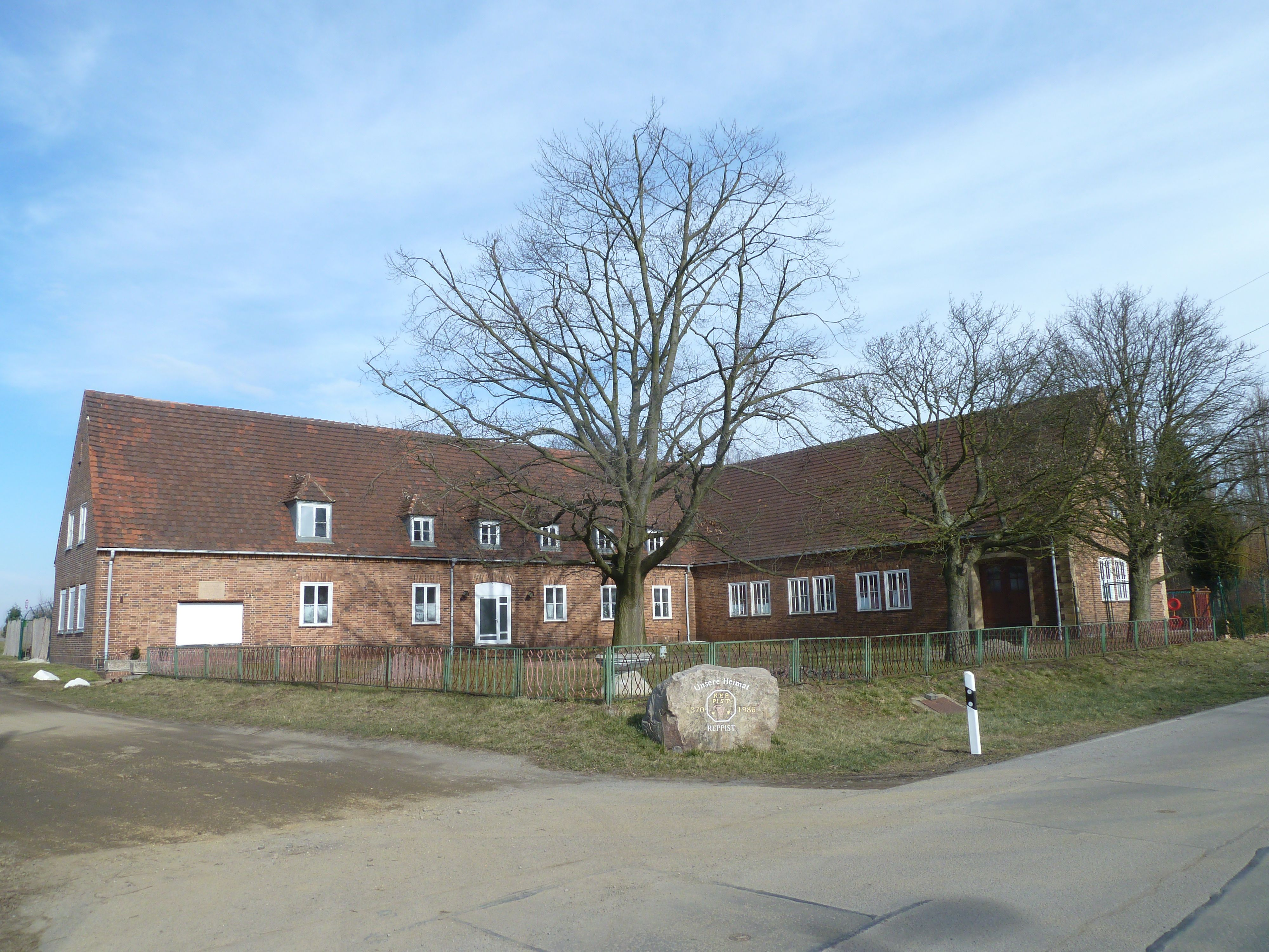 Reppist, denkmalgeschütztes früheres Kulturhaus